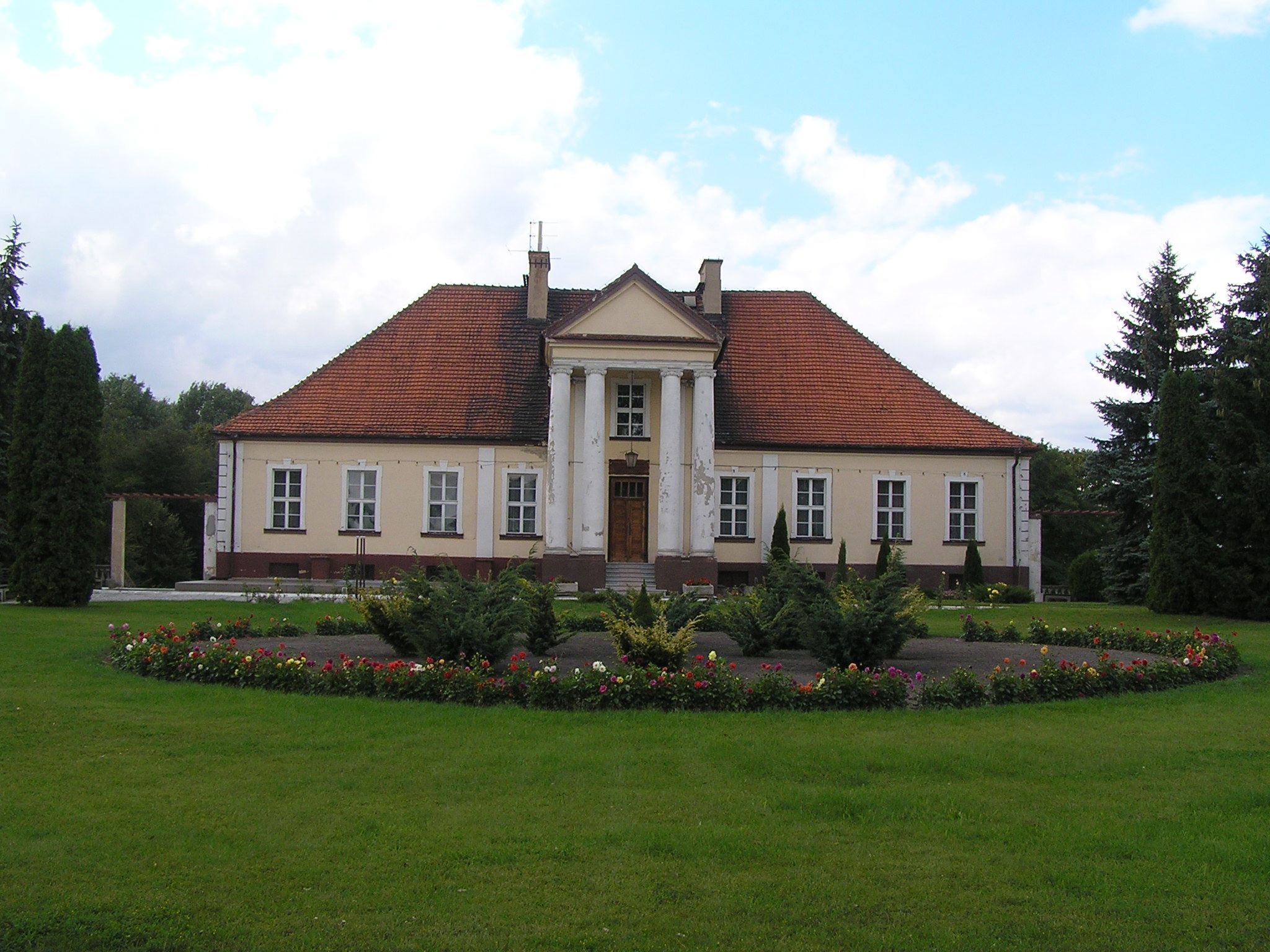 Główny budynek zespołu pałacowego w Srebrnej Górze